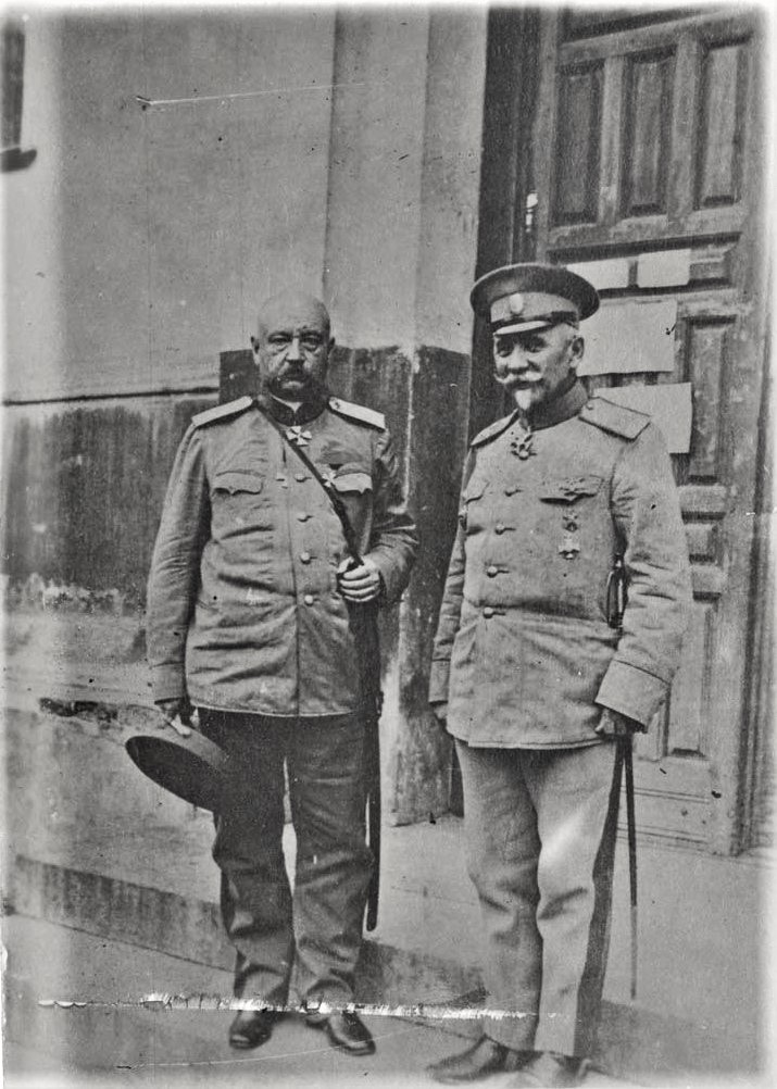 Юденич (слева)